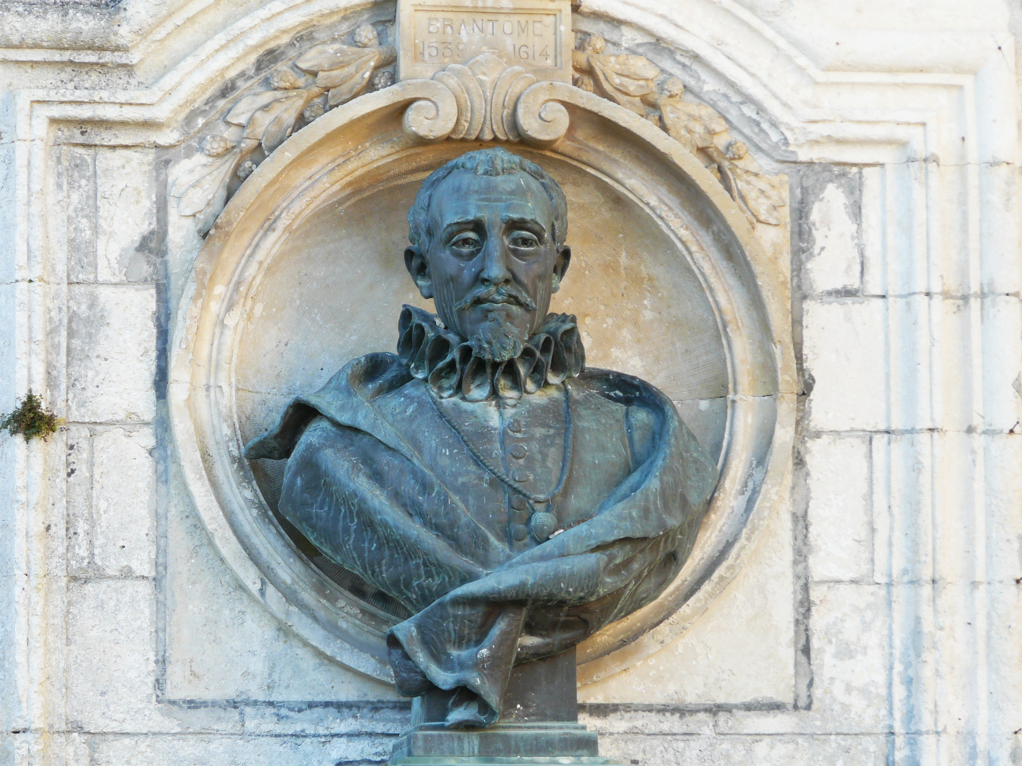 Buste de Pierre de Bourdeille dit "Brantôme", fontaine Médicis, Brantôme, Dordogne, France